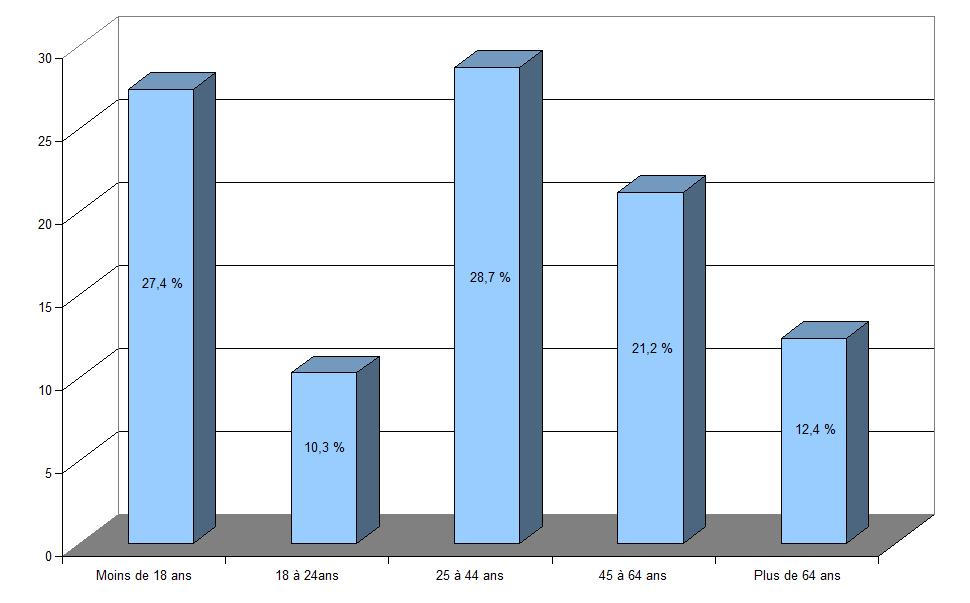 Pyramide des âges du comté de Marion (Oregon, Etas-Unis), selon le recensement de 2000.